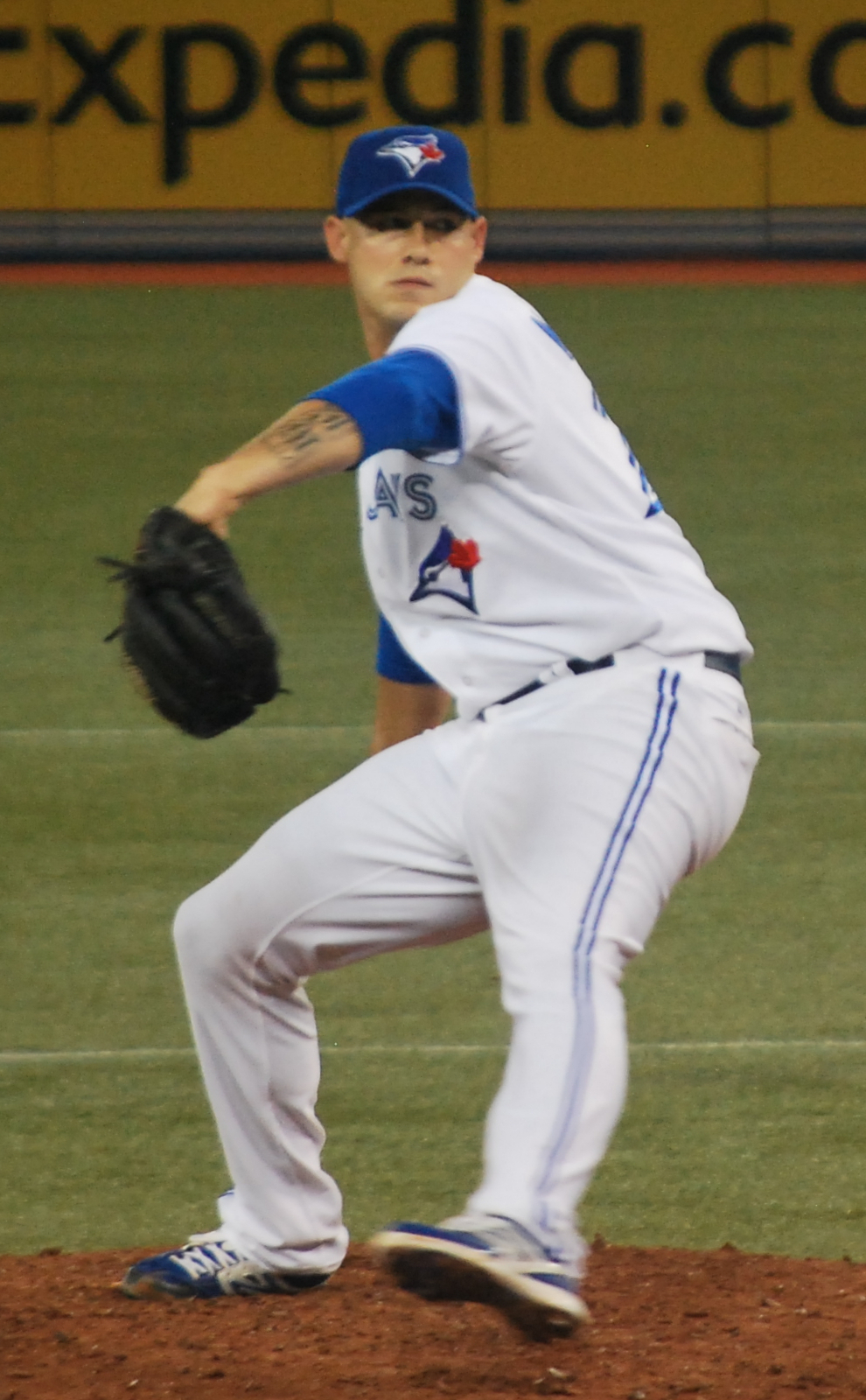 Dustin McGowan